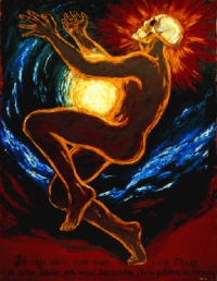 Beschreibung: Man muss noch Chaos in sich haben, um einen tanzenden Stern gebären zu können. Illustration zu Friedrich Nietzsche: "Also sprach Zarathustra"